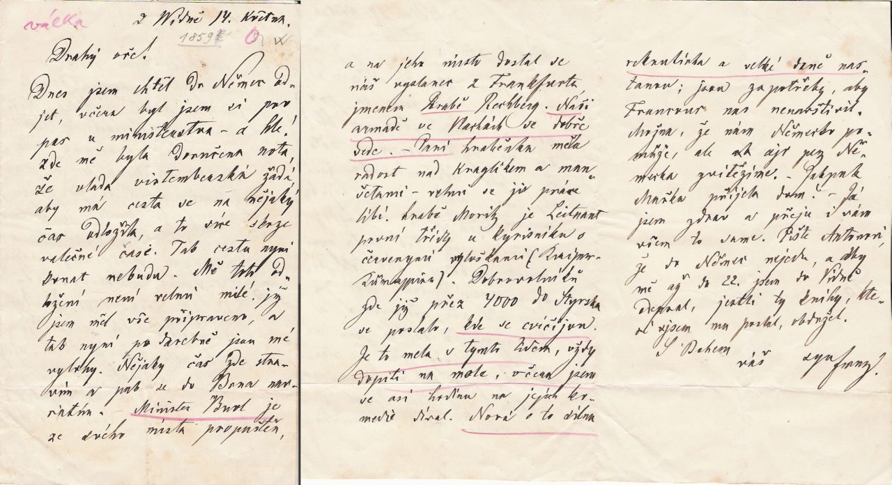 Jeden z dopisů Bedy Dudíka.